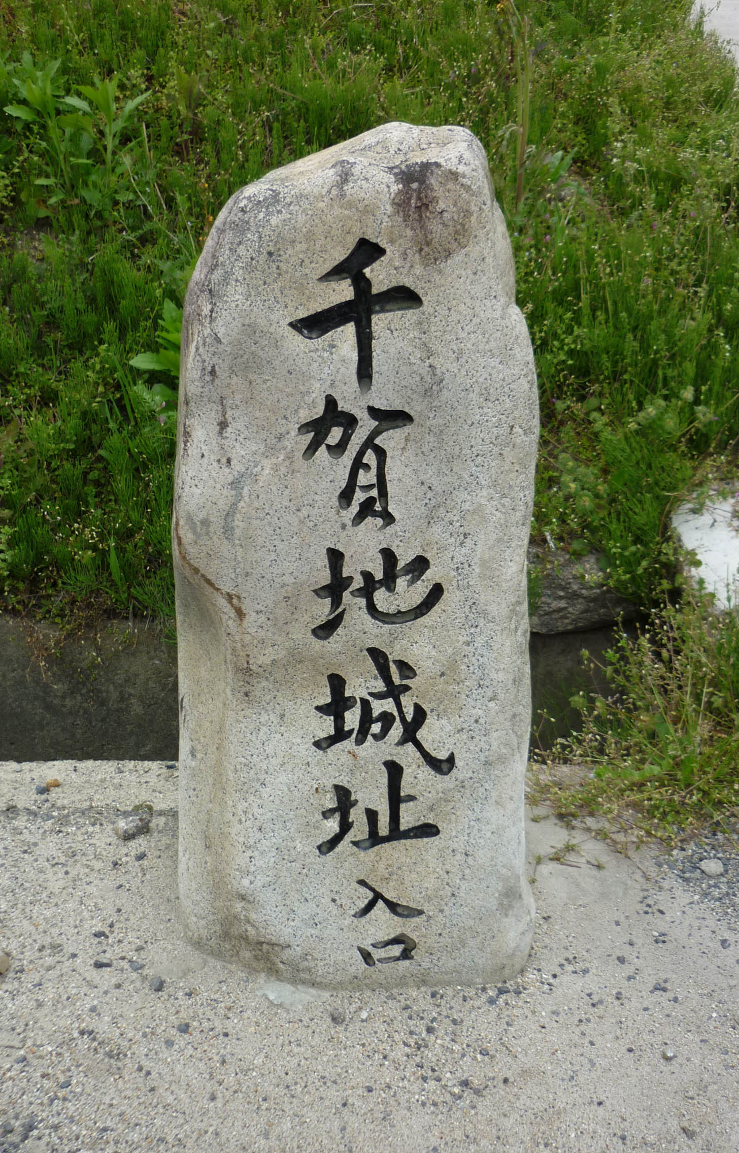 千賀地城の入り口石標